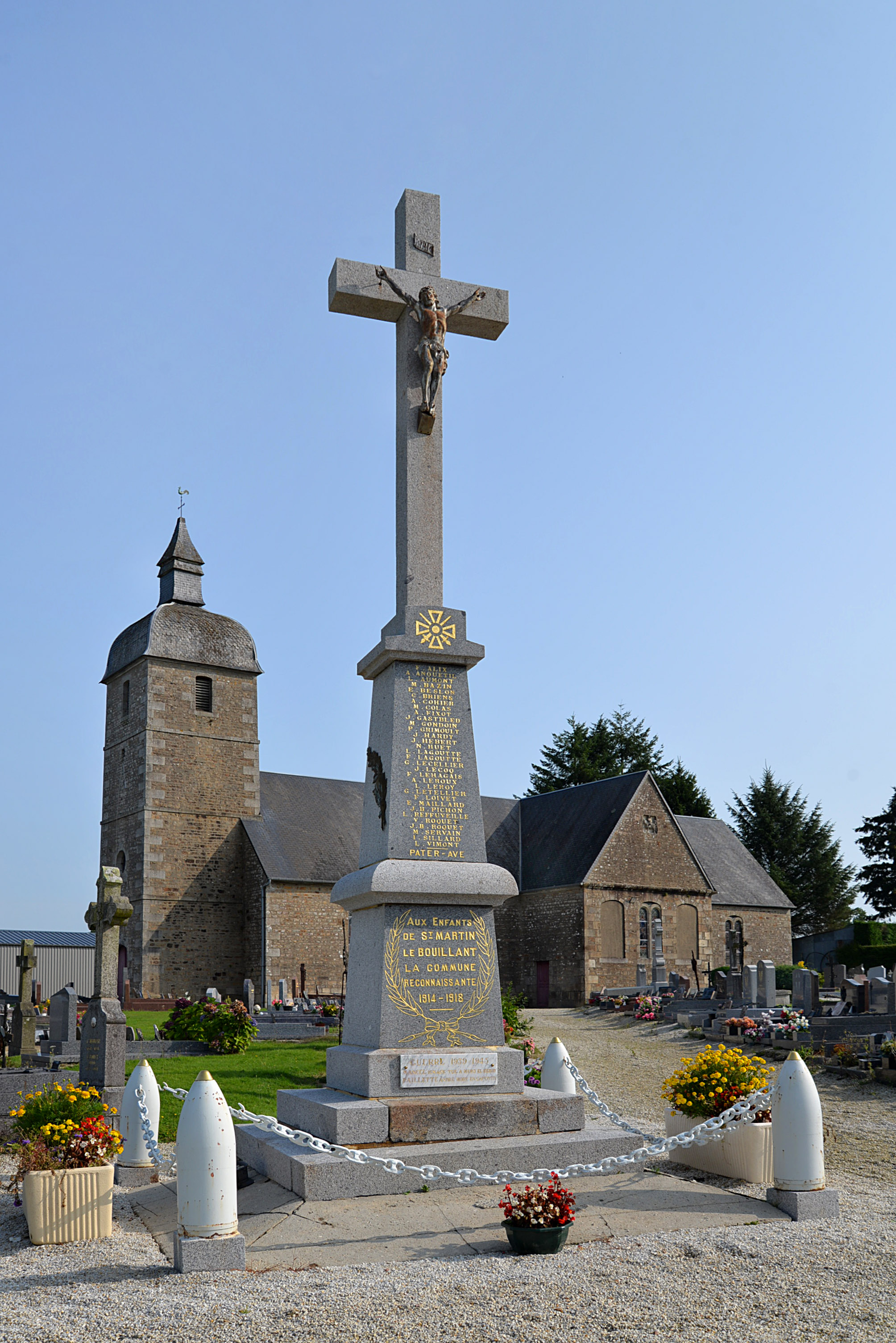 Saint-Martin-le-Bouillant (Manche)